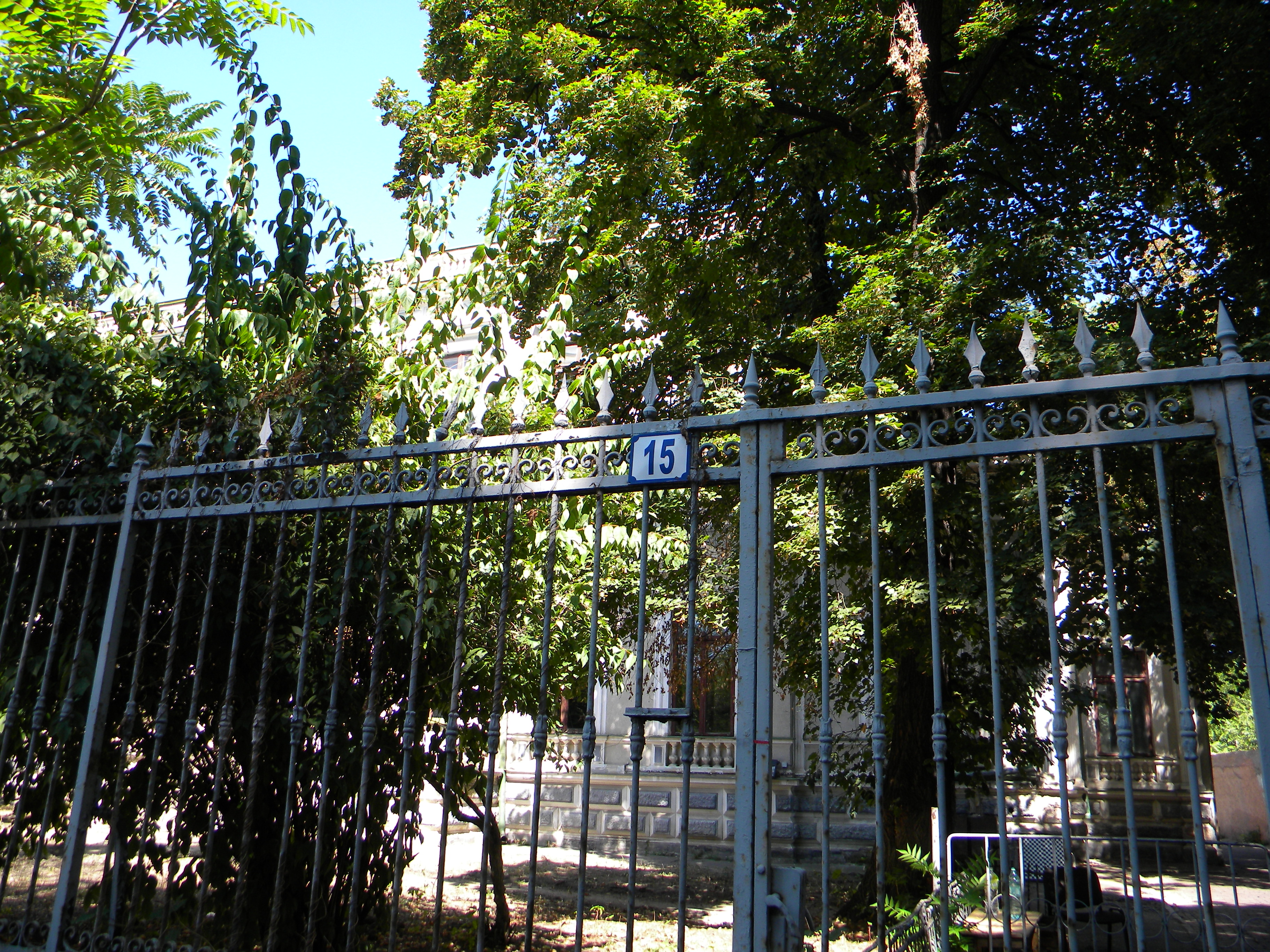 Bucuresti, Romania, Str. General Constantin Budisteanu nr. 15 (Casa Crissovelloni); B-II-m-B-18242 (detaliu)